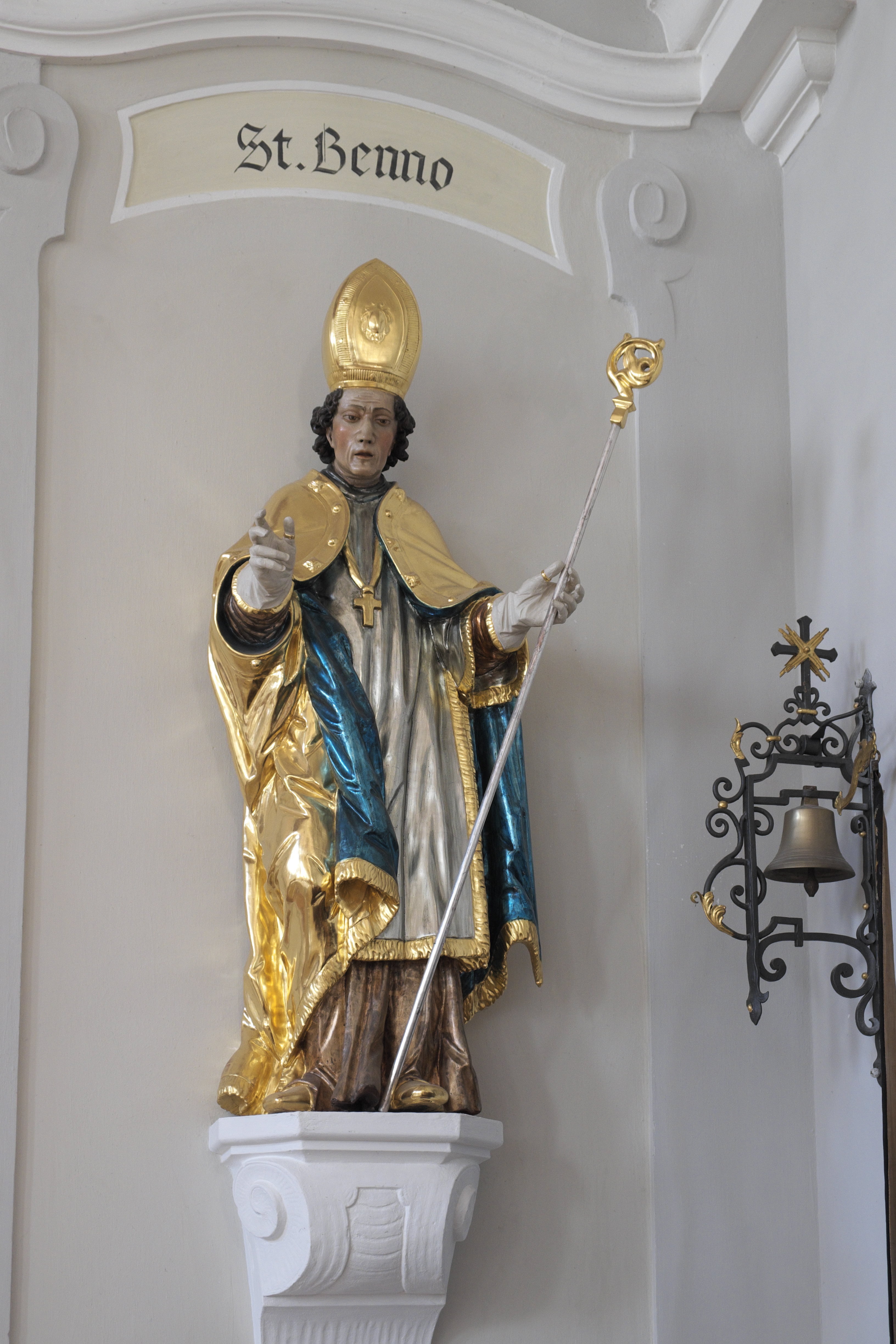 Katholische Pfarrkirche St. Vitus in Maisach im Landkreis Fürstenfeldbruck (Bayern/Deutschland), Bischof Benno von Meißen